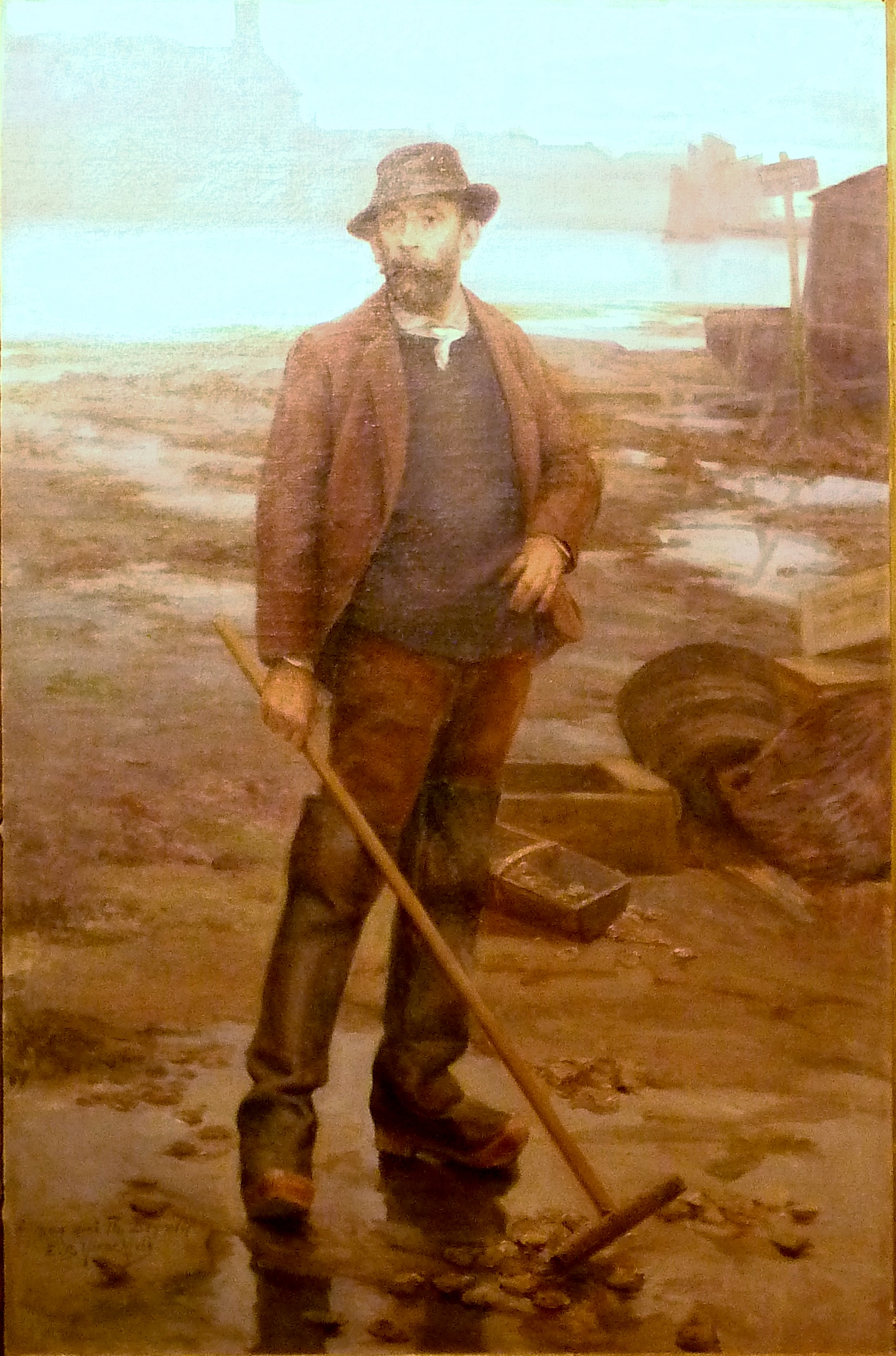 Emil-Benedicktoff Hirschfeld : Théophile Deyrolle sur le banc d'huîtres (huile sur toile)